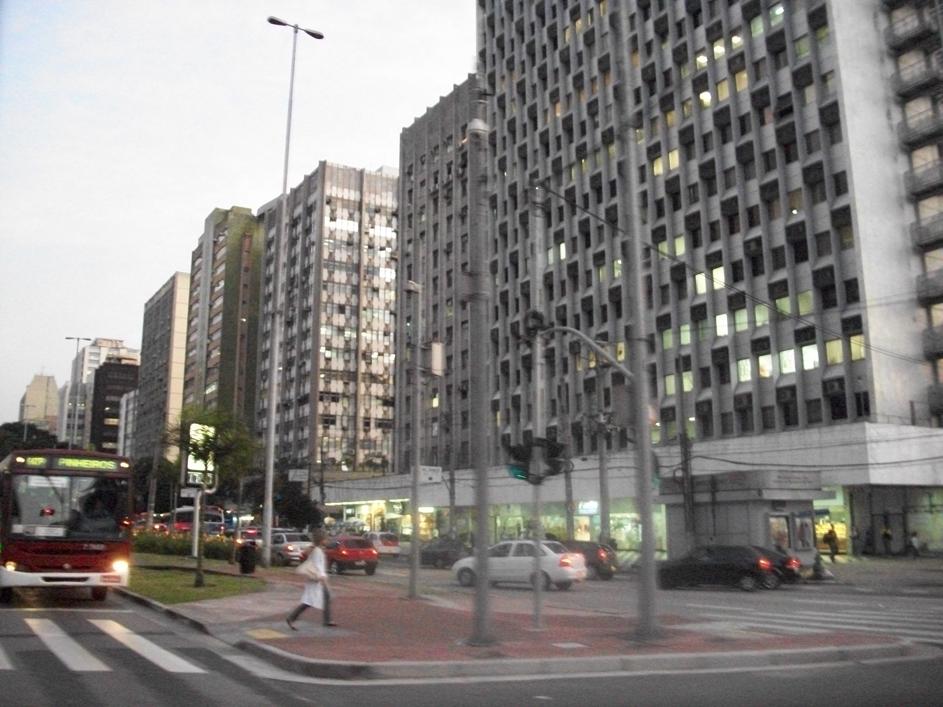 Prédios da Avenida Rebouças.